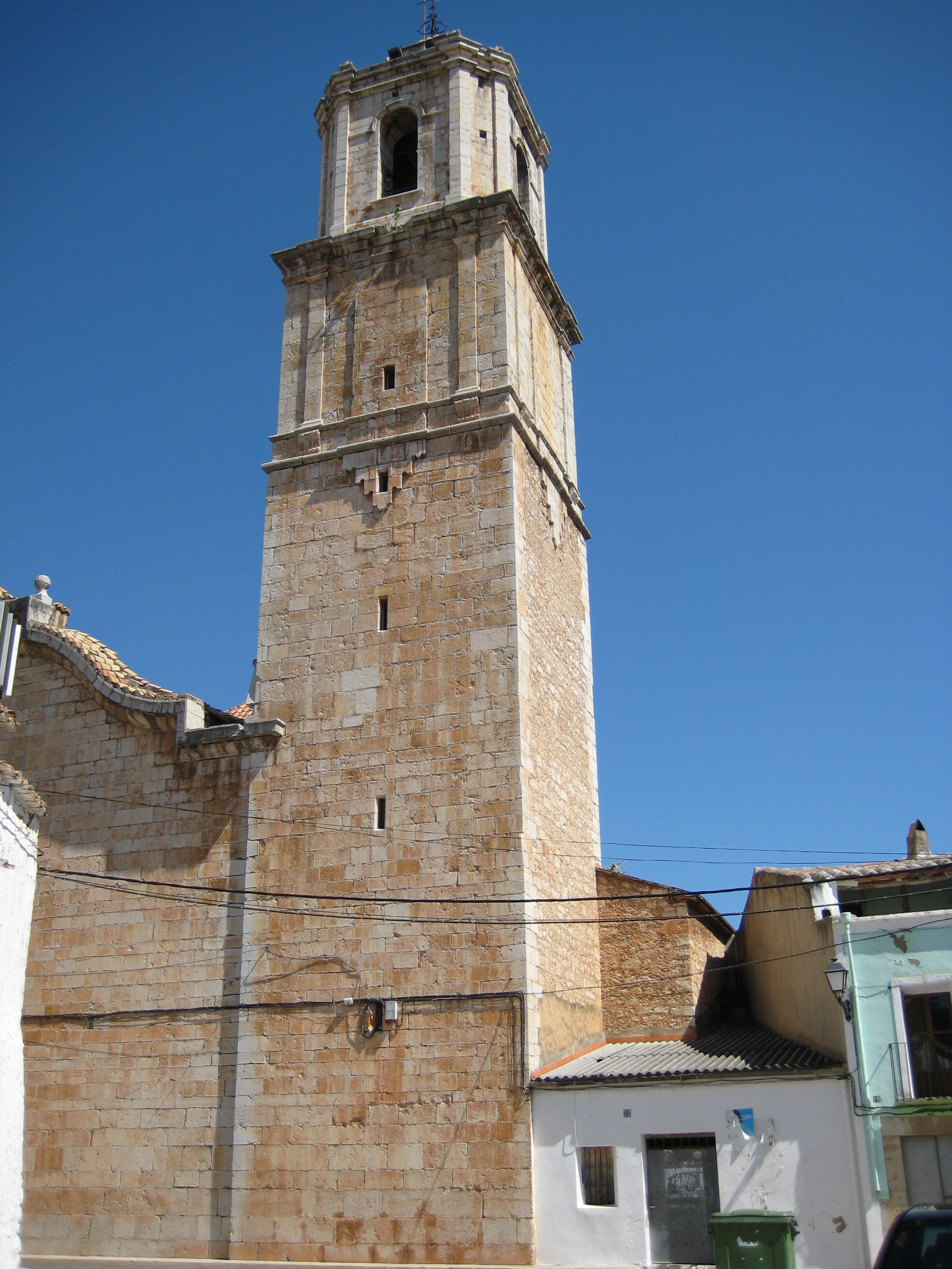 Torre campanar de l'església de l'Assumpció de La Salzadella (Baix Maestrat)